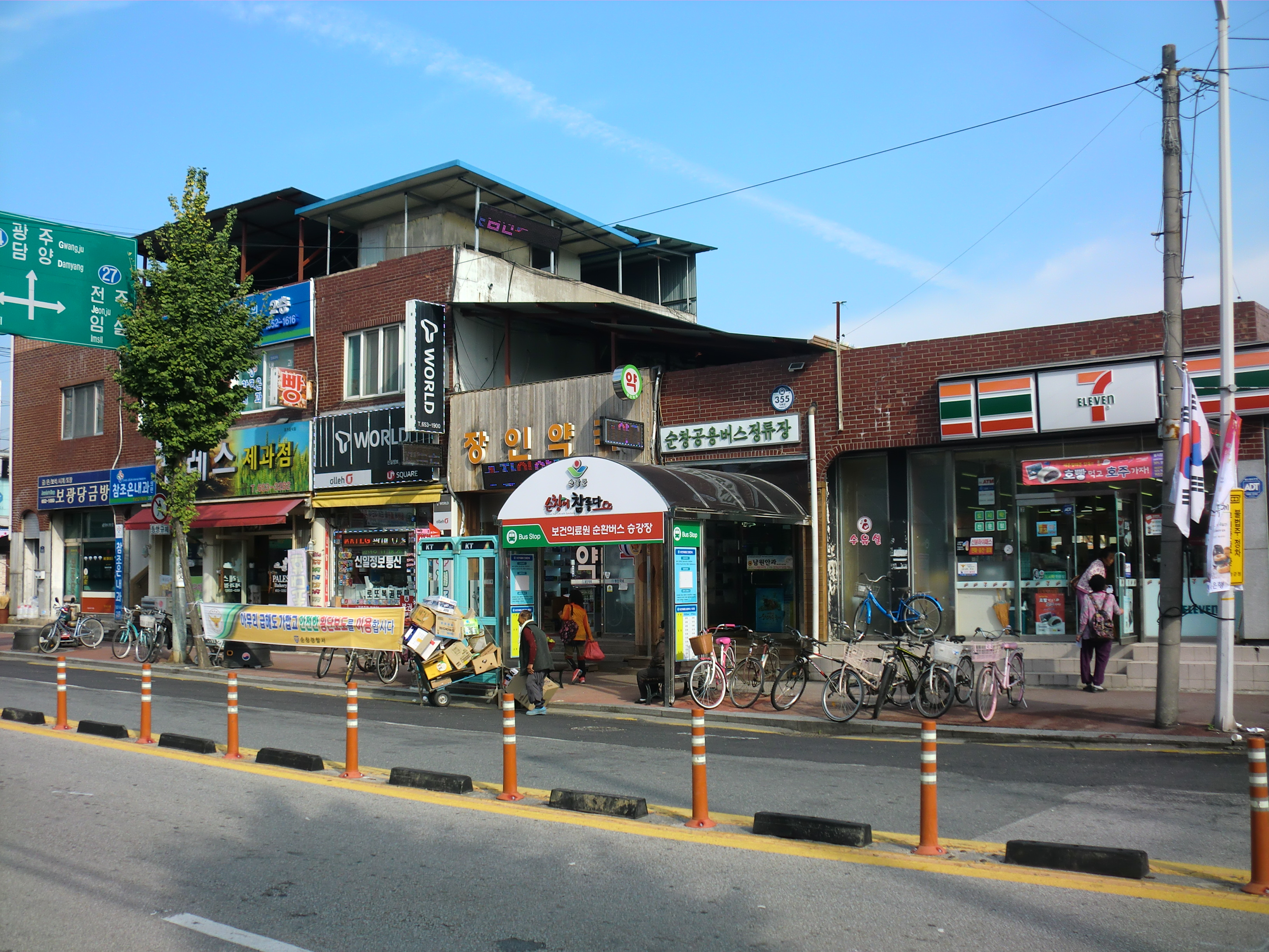 전라남도 순창군에 있는 순창공용버스정류소